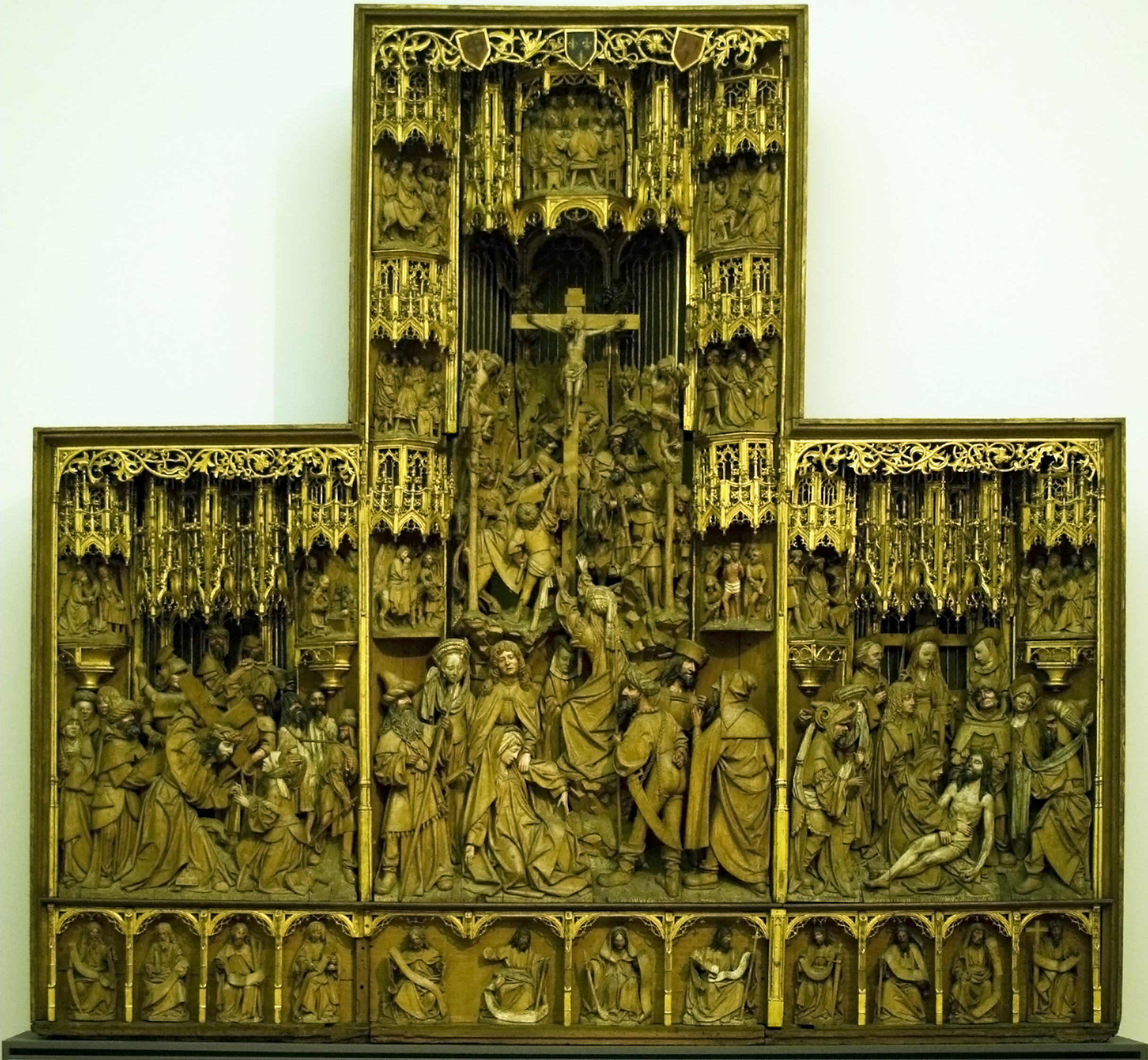 Retabel mit Darstellungen aus der Liedensgaschichte Christi (Antwerpen), erworben 1915, inv. 7700